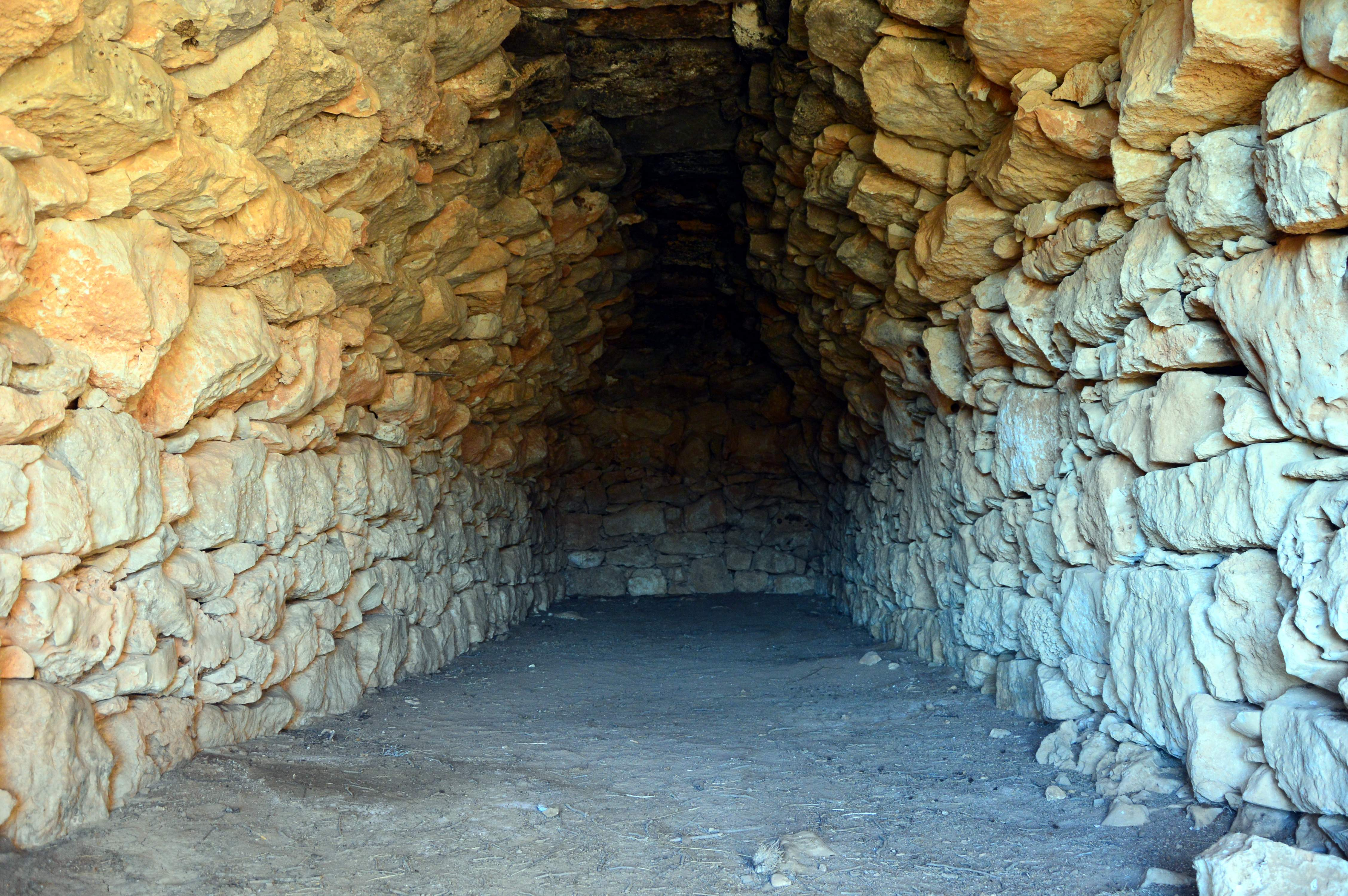 Detalle del interior de la Barraca Grande del Pinar (Casasbajas, Valencia), 2018.